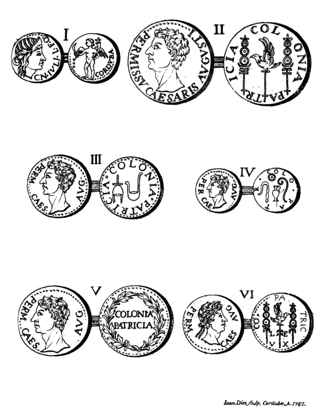 Escudo de Córdoba, dibujo de Ioan Díez aparecido en el libro Historia General de Córdoba (1761) del autor Francisco Ruano, página 286.